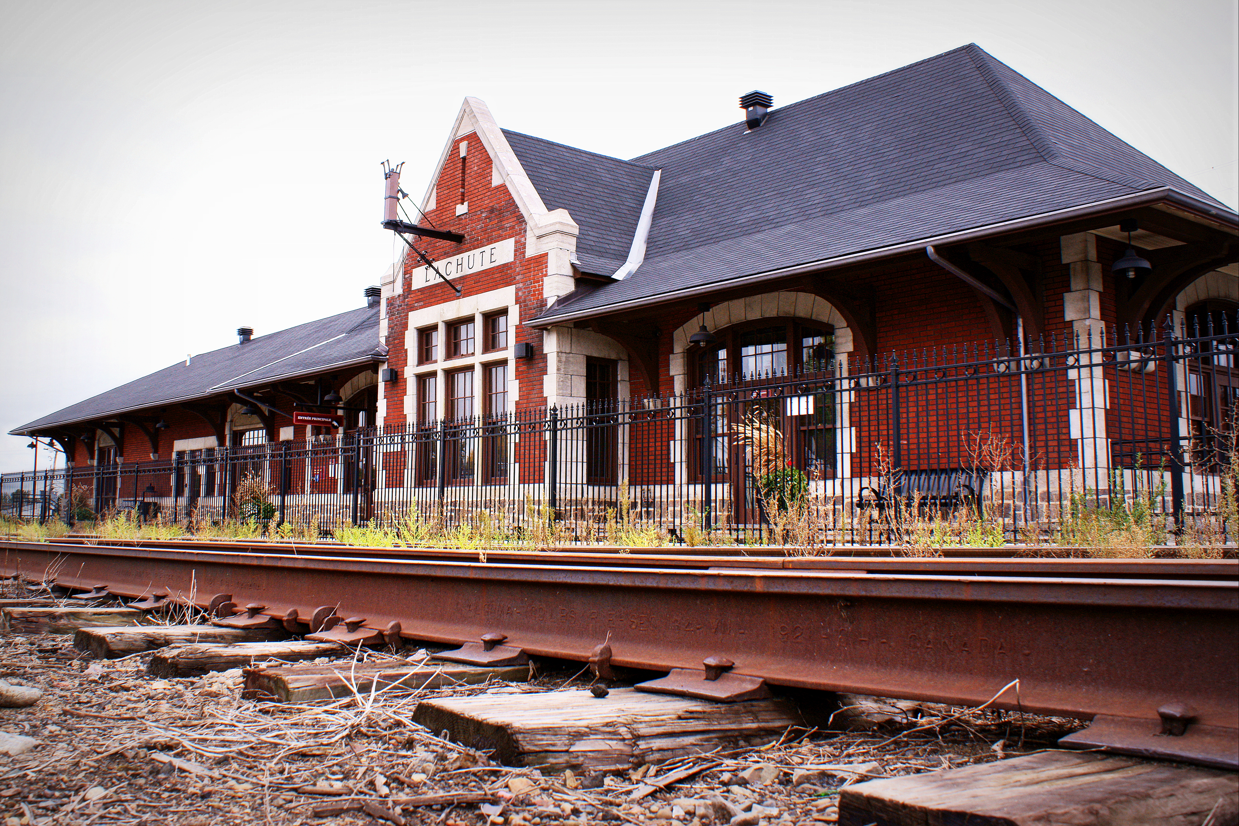 Gare de Lachute, 540, rue Berry, Lachute (Canada). (Protection MH cité. Voir la liste des lieux patrimoniaux des Laurentides pour plus de détails).